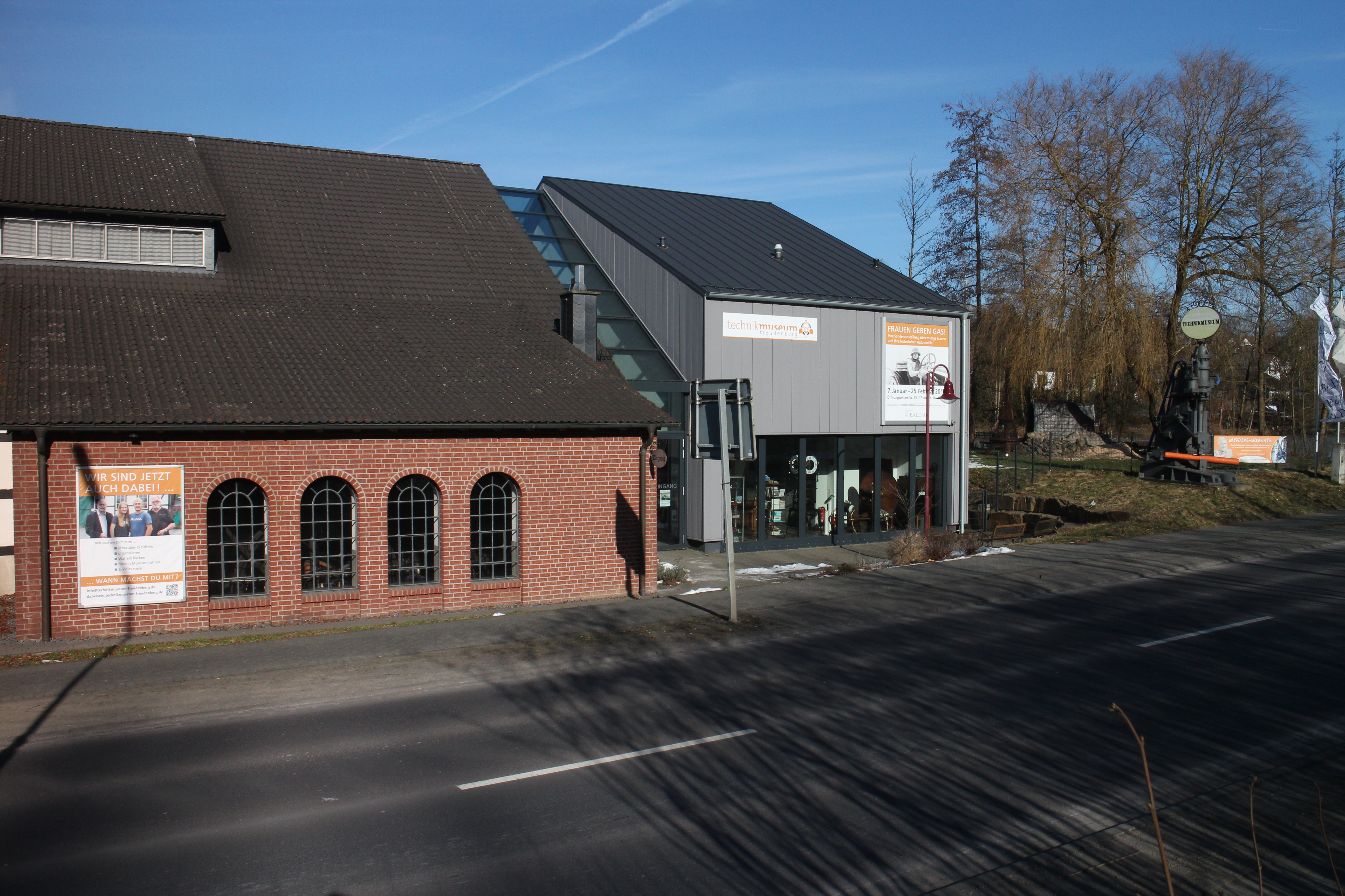 Außenansicht des Eingangsbereichs und des Maschinenhauses des Technikmuseums Freudenberg